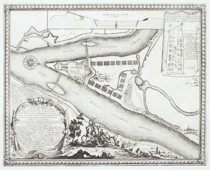 Gdańska Głowa w 1696, nieistniejący posterunek obronny Gdańska.